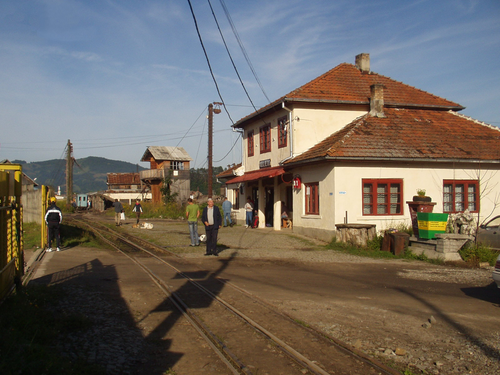 Bahnhof der Wassertalbahn auf dem Gelände der R.G.Holz Company in Vişeu de Sus